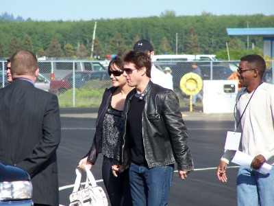 Tom Cruise & Katie Holmes